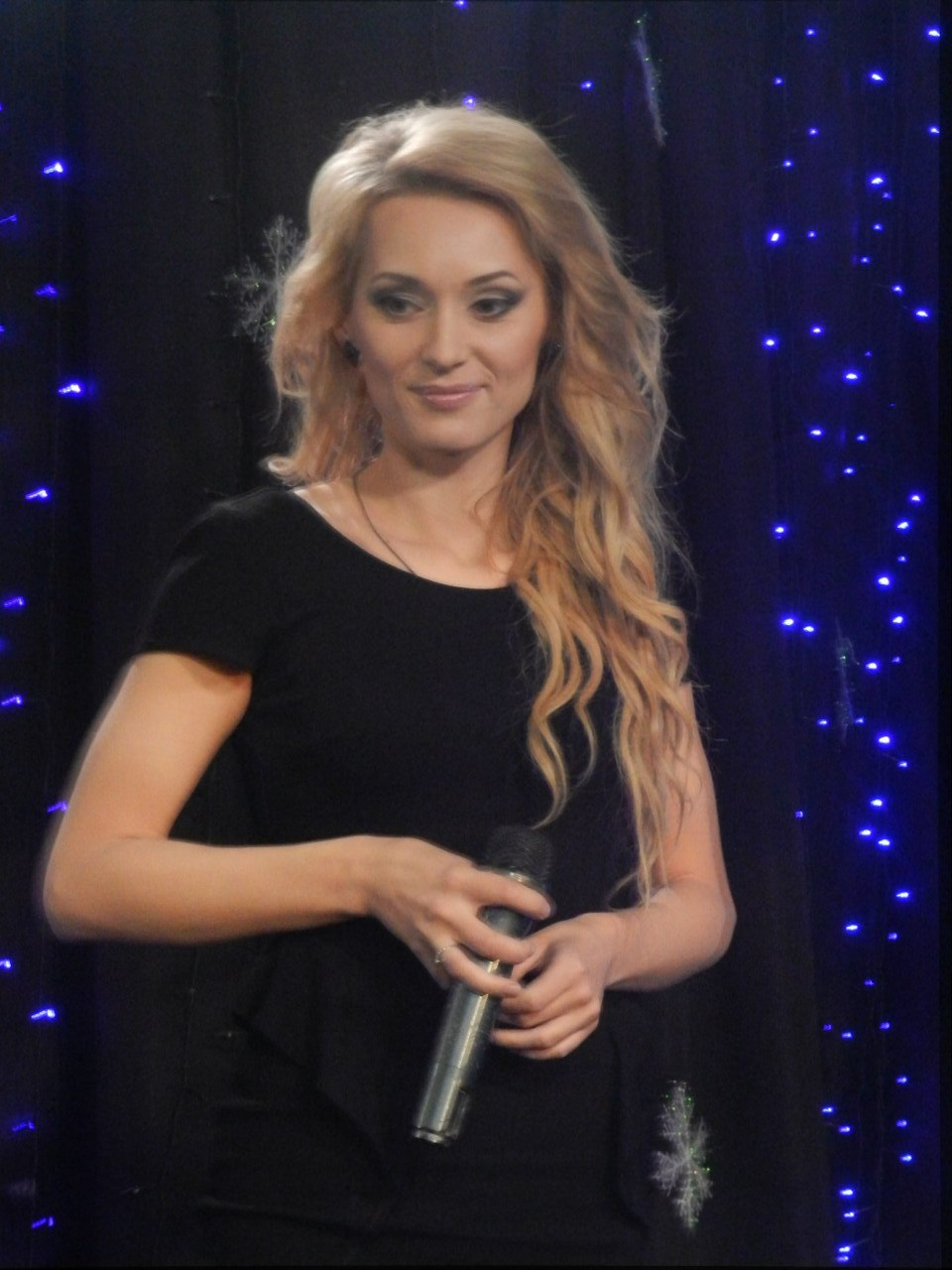 Аида на встрече с поклонниками в клубе Sorry бабушка, Киев